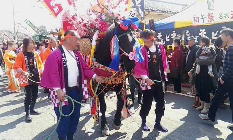 鹿児島県霧島市にある鹿児島神宮で行われる初午祭（はつうまさい）の画像。